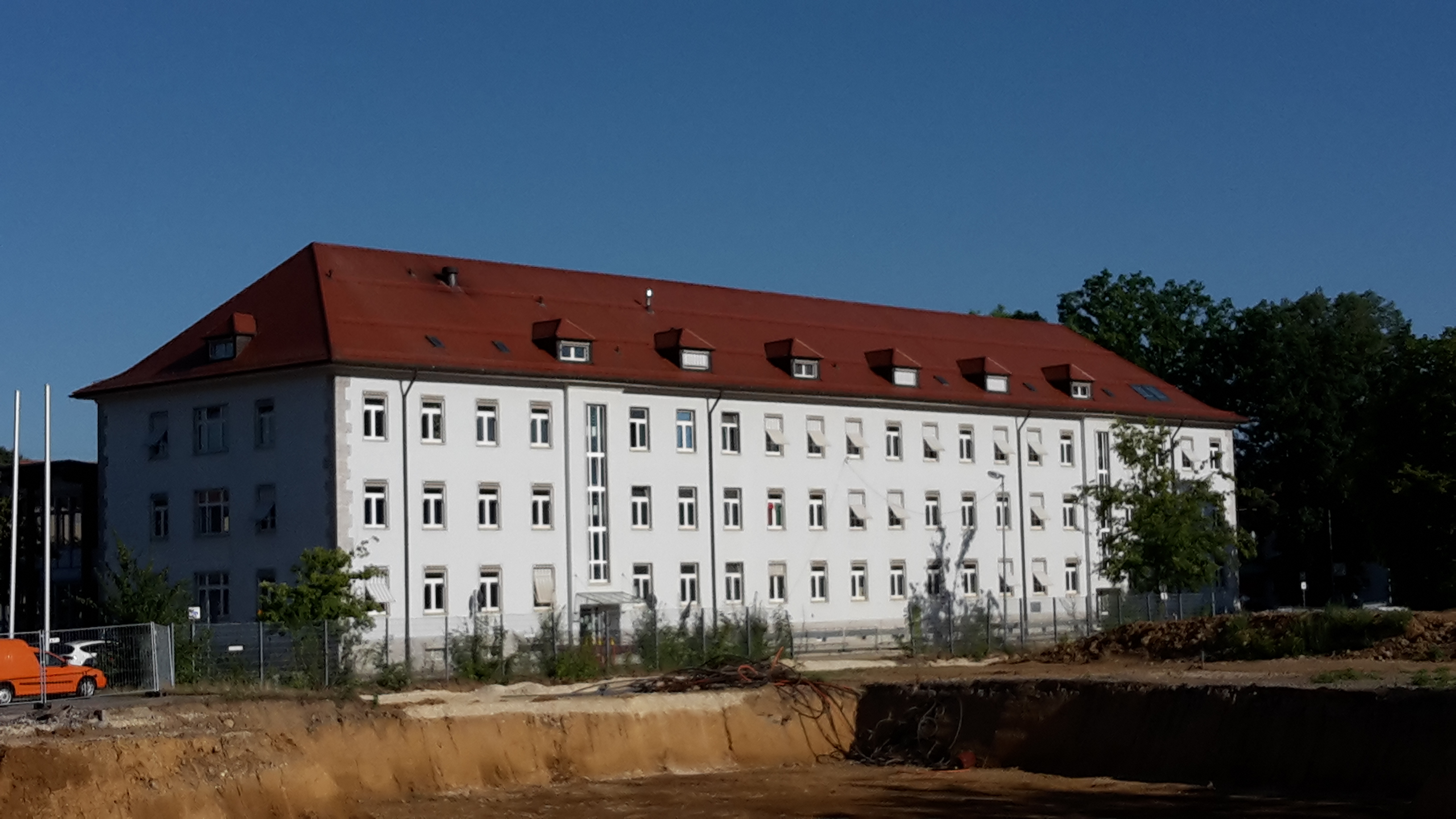 Landesanstalt für Entwicklung der Landwirtschaft und der ländlichen Räume